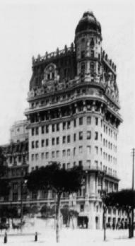 Edificio "Railway Building" en la ciudad de Buenos Aires, Argentina. Hoy parte del Ministerio de Economía.